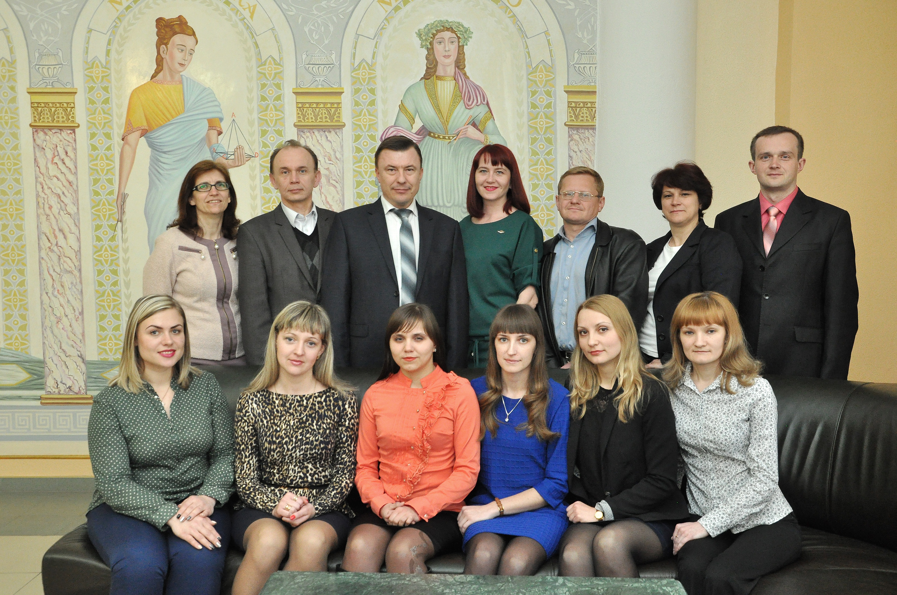 Колектив деканату факультету іноземних студентів Тернопільського державного медичного університету імені І. Я. Горбачевського. Стоять: Олена Покришко, Михайло Фурдела, Петро Сельський, Ірина Кіндрат, Олександр Токарський, Наталія Саніцька, Юрій Петрашик. Сидять: невідома, невідома, невідома, невідома, невідома, Ярослава Андрейчук.